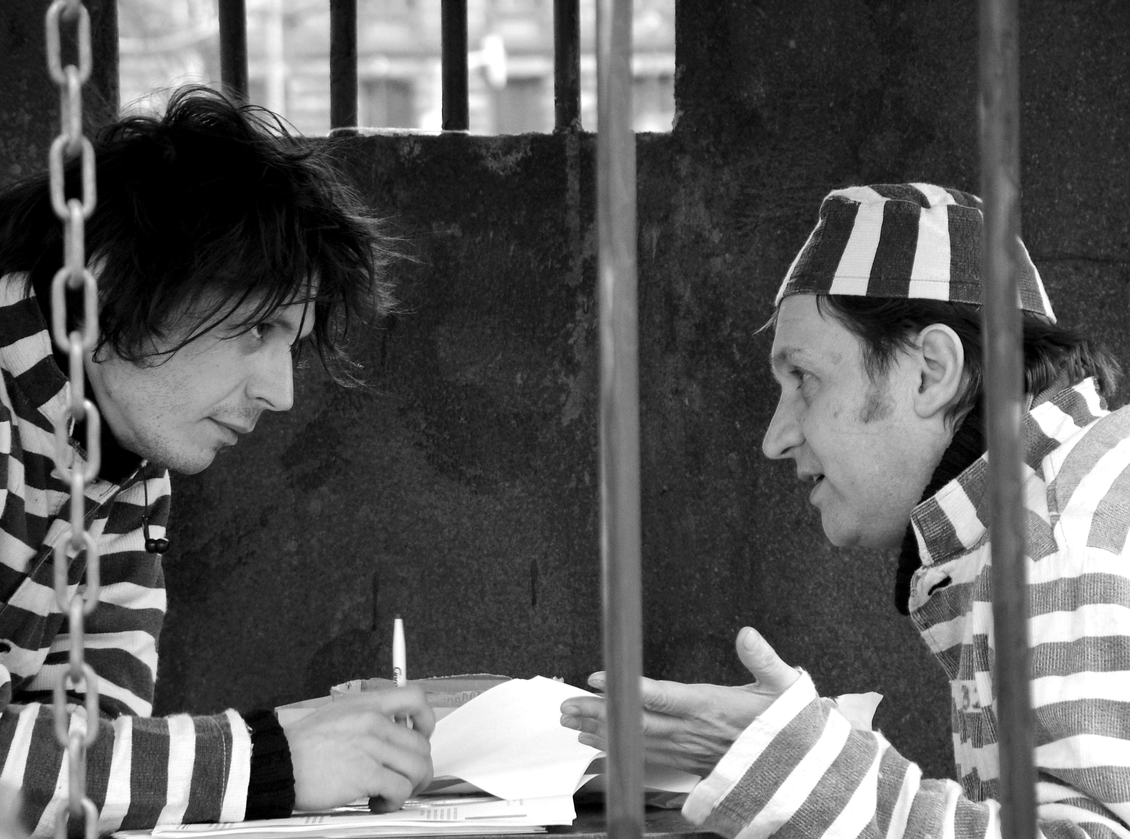 David Černý a ???. Akce: Vězni na Václavském náměstí, Praha, 15. března 2004, Symboličtí vězni (politici, bývalí disidenti, ochránci lidských práv a umělci) na Václavském náměstí protestují proti castrovskému režimu. Česko se připojilo k protestům proti porušování lidských práv na Kubě.